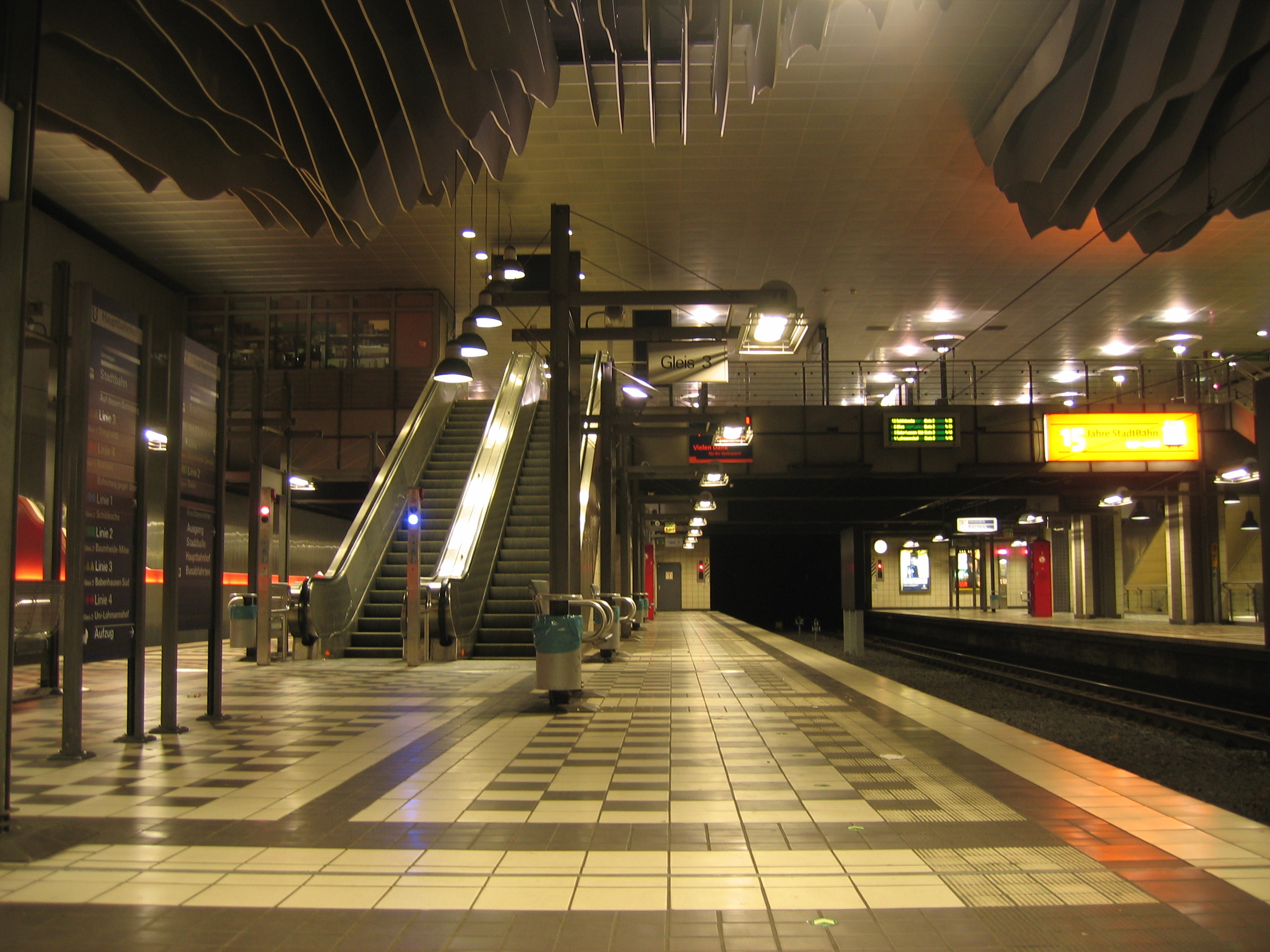 Stadtbahn Bielefeld, U-Bahnstation Hauptbahnhof